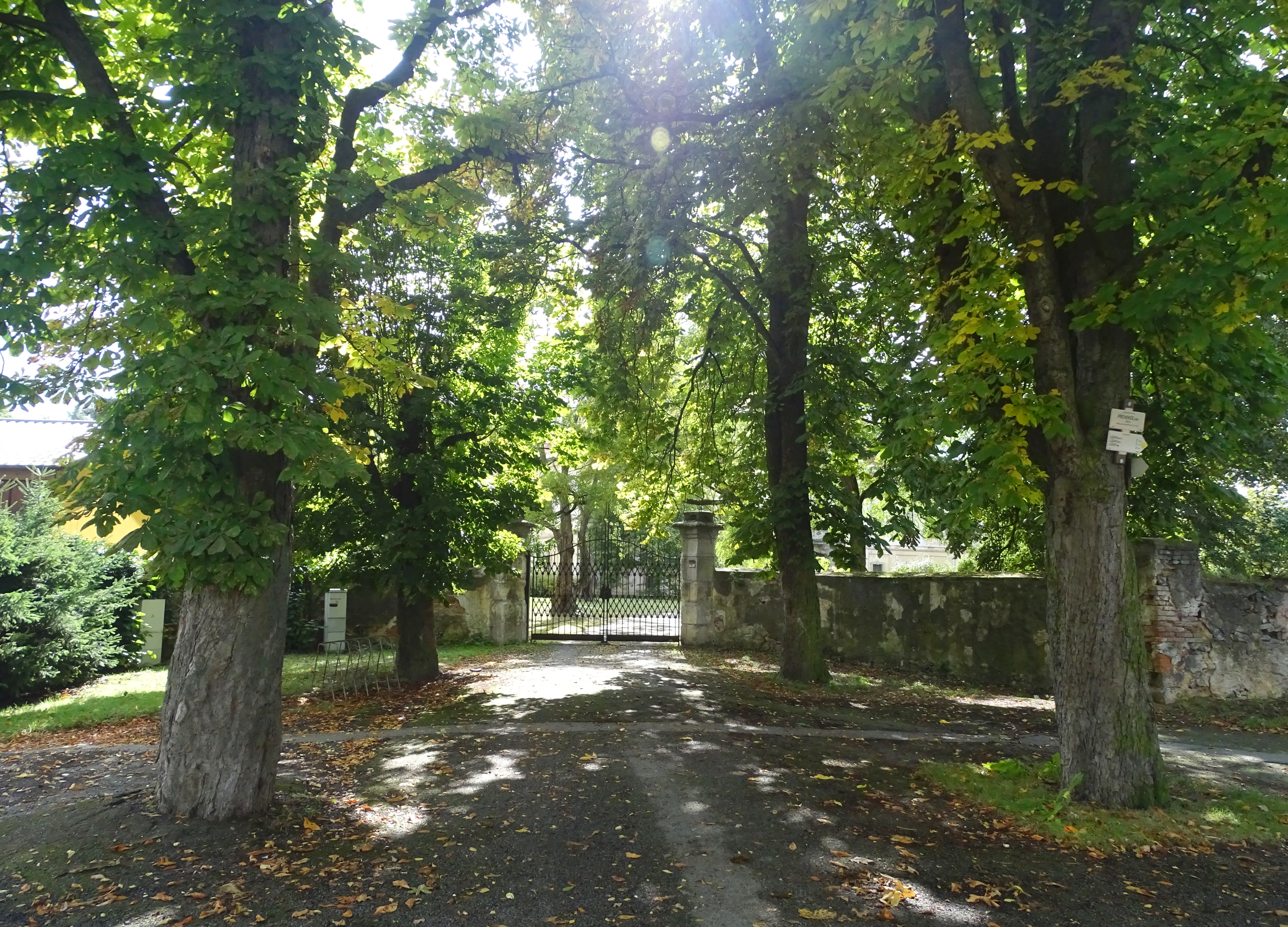 Vstup do areálu zámku Příchovice, severní brána.